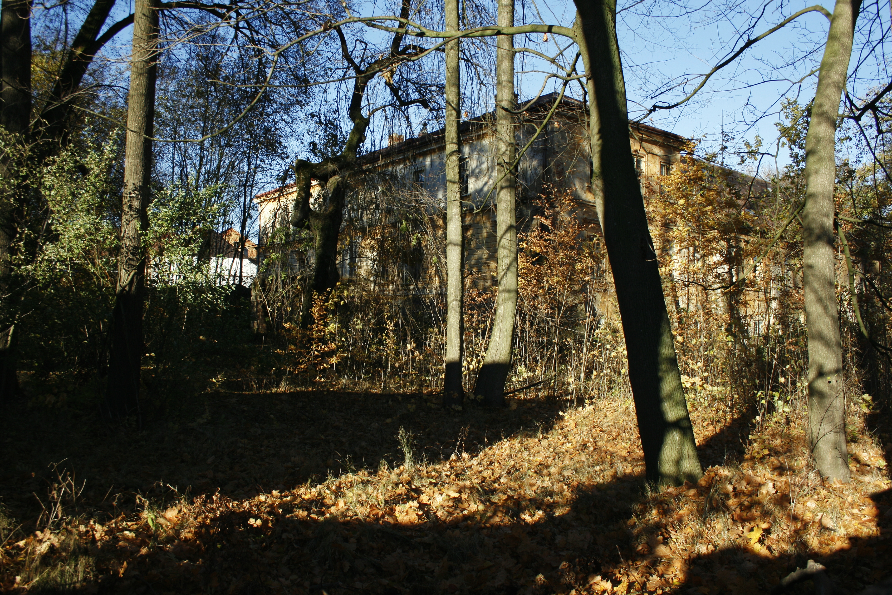 Zámek Kanice, okres Domažlice